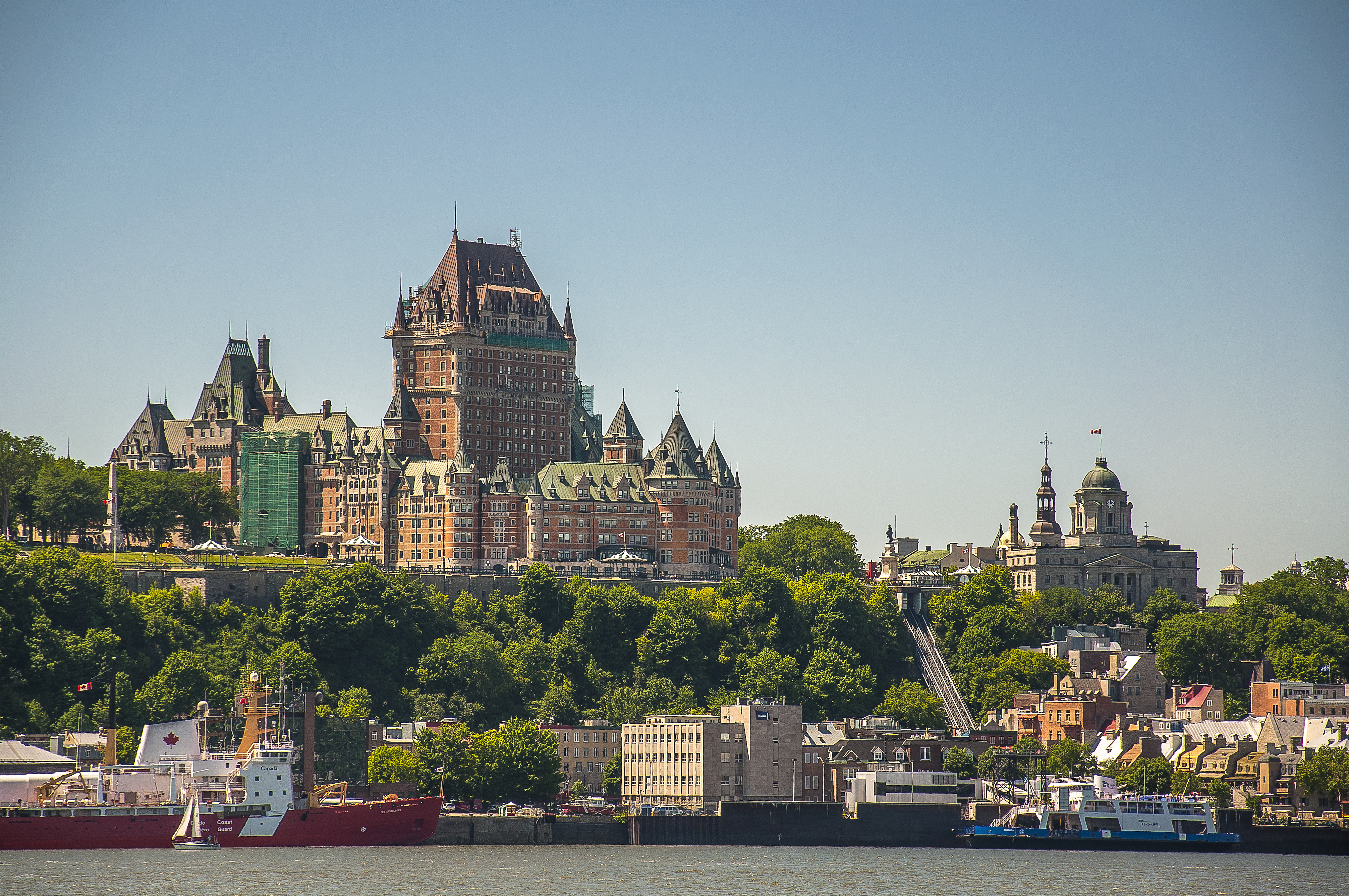 Le Chateau Frontenac vu depuis la piste cyclable de Lévis